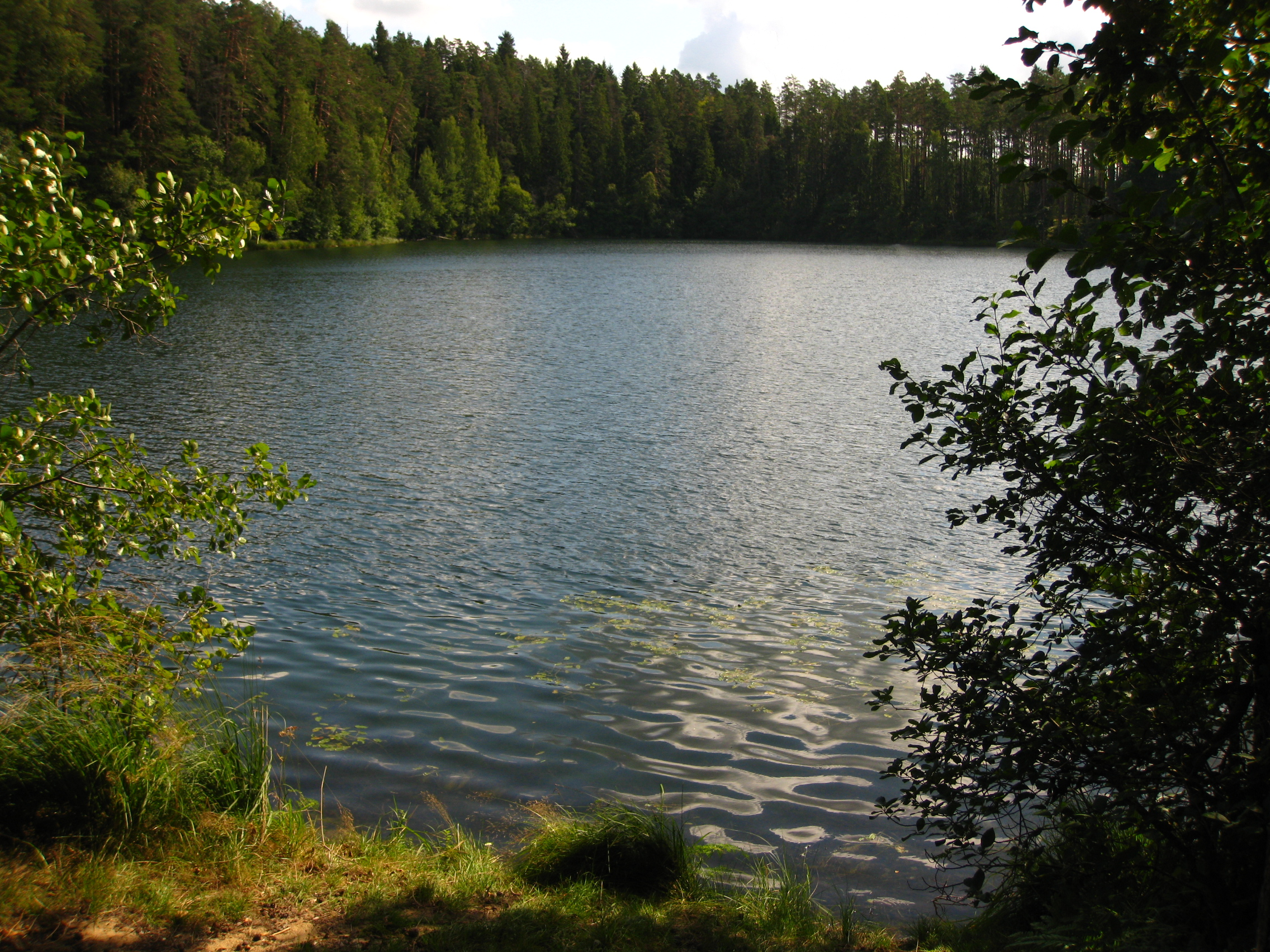 Paukjärve läänekaldal